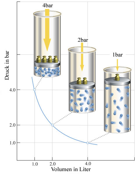 Diagramm zur schematischen Darstellung des Zusammenhanges zwischen Druck und Volumen einer abgeschlossenen Gasmenge